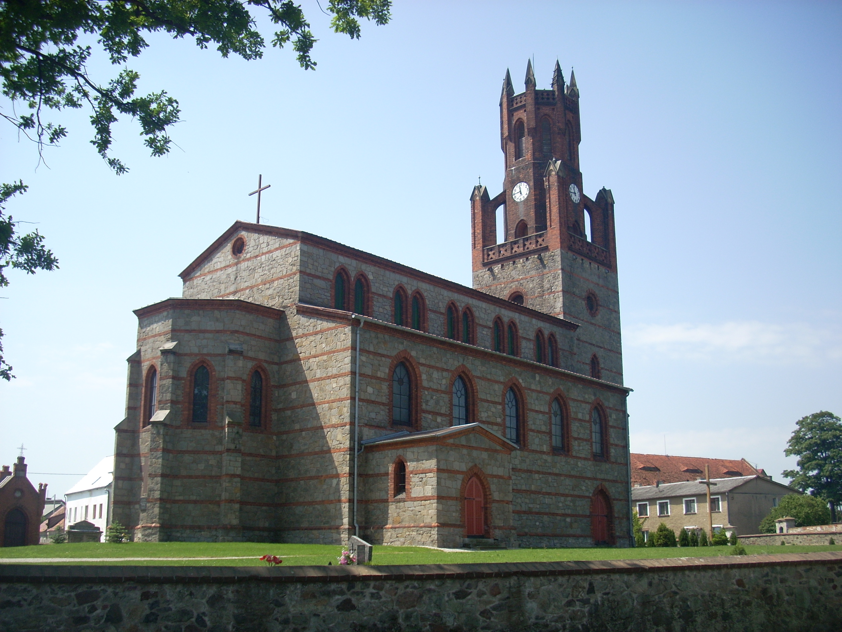 Oleszna, Kościół filialny p.w. Wniebowzięcia NMP